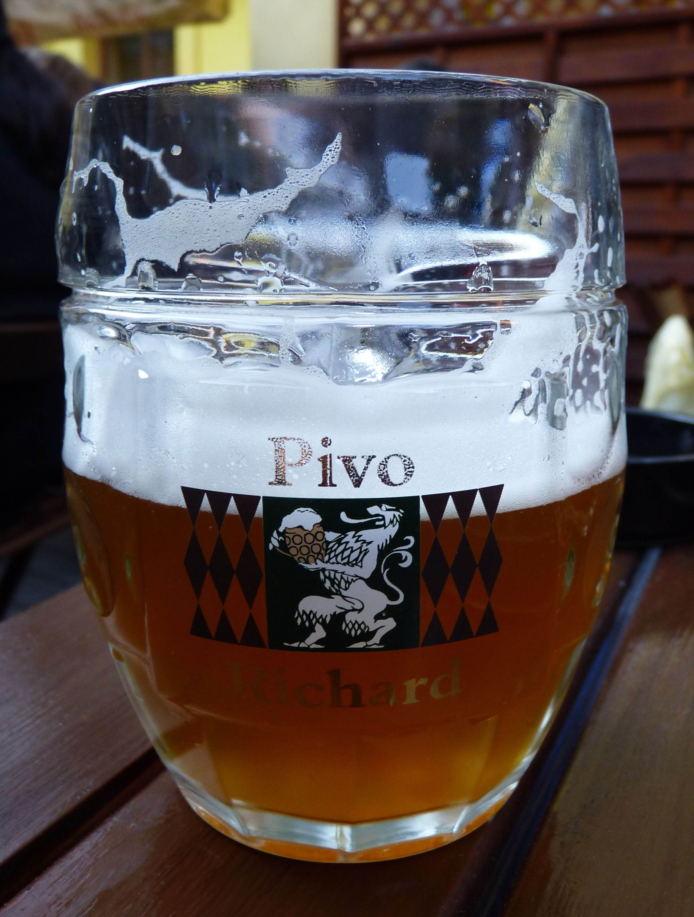 Pivo Richard, restaurace U Richarda, Brno